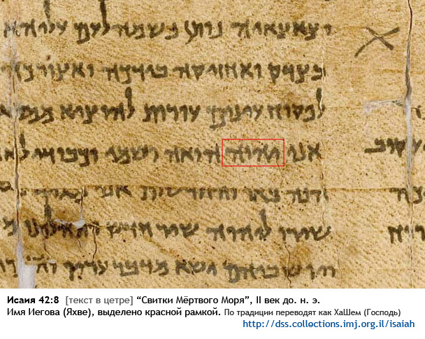 Исаия 42:8 - имя Иегова (по традиции переводят как ХаШем, т. е. Господь) выделено красной рамкой. "Свитки Мётрвого Моря" 2 век до н. э.